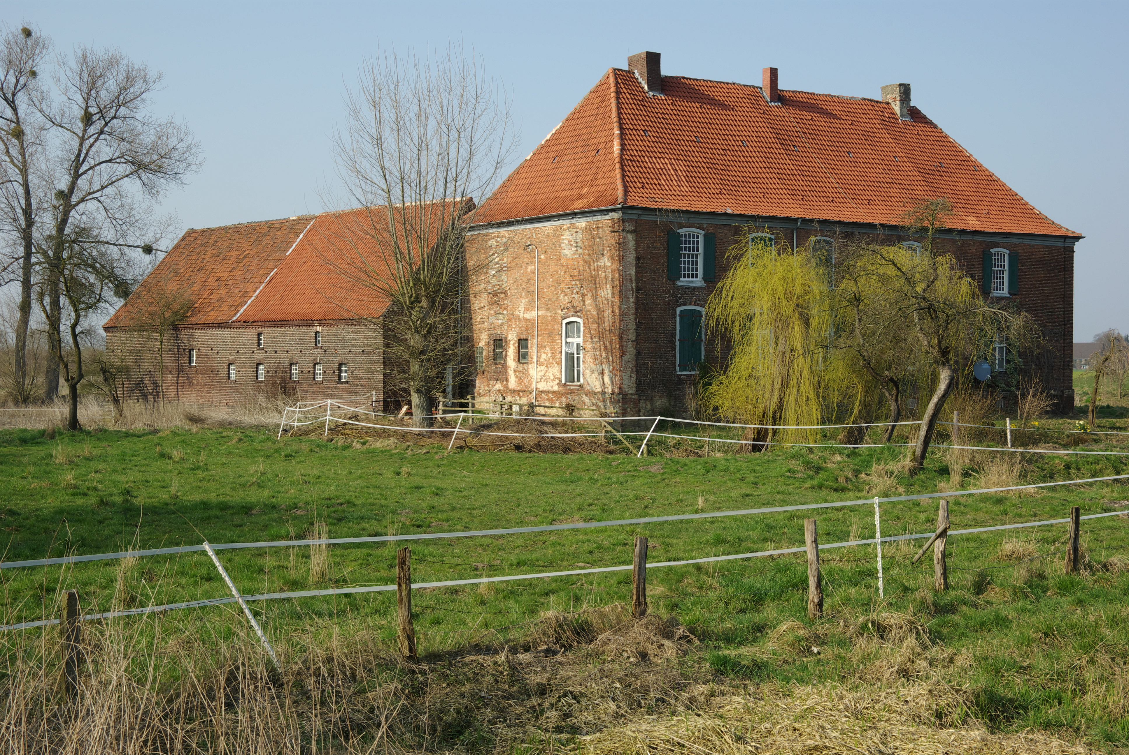 Haus Hohenover bei Süddinker, Hamm, Nordrhein-Westfalen